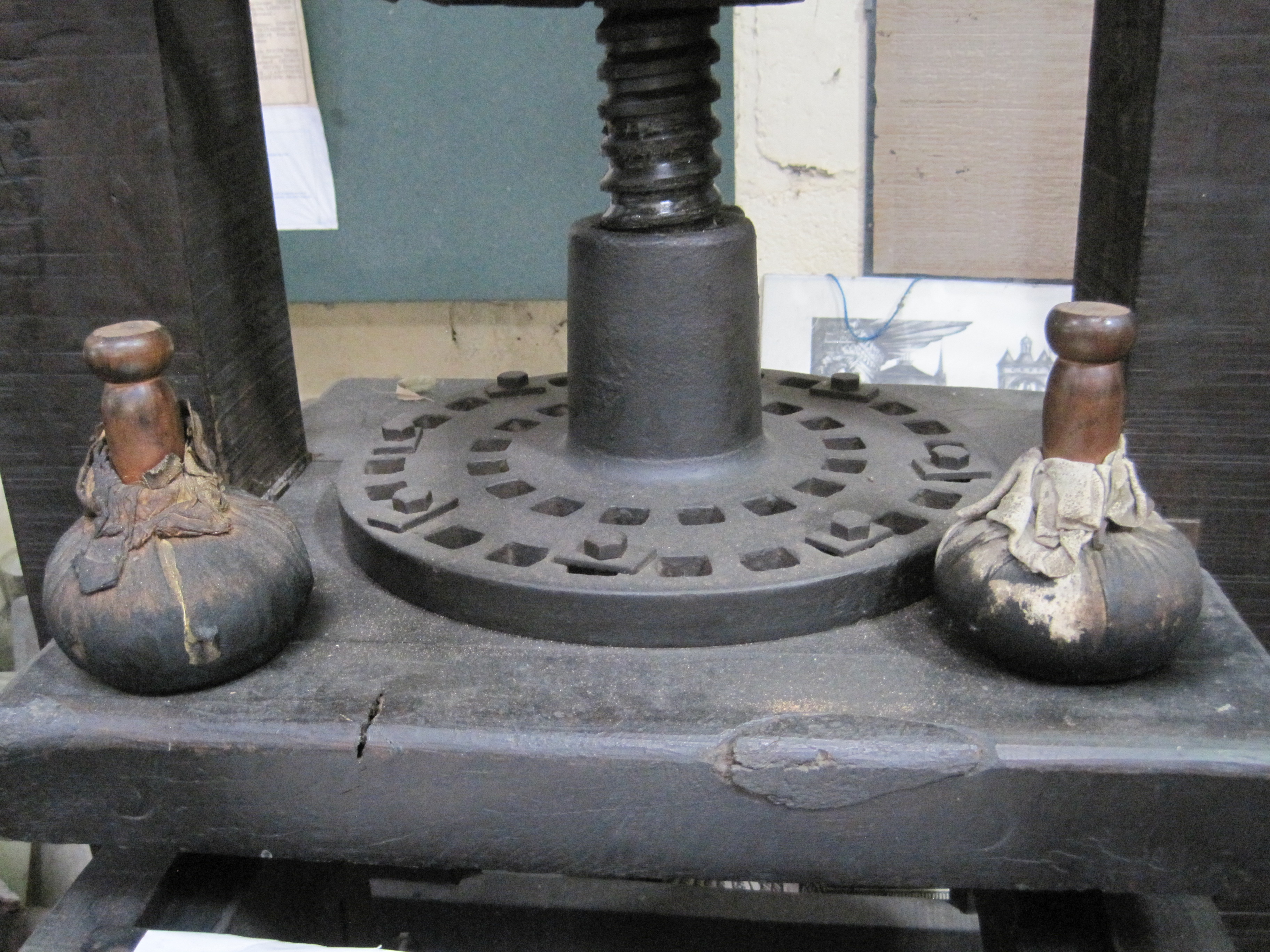 Les balles sont constituées de pelote de crin, recouverte de cuir, souvent faite de peau de chien